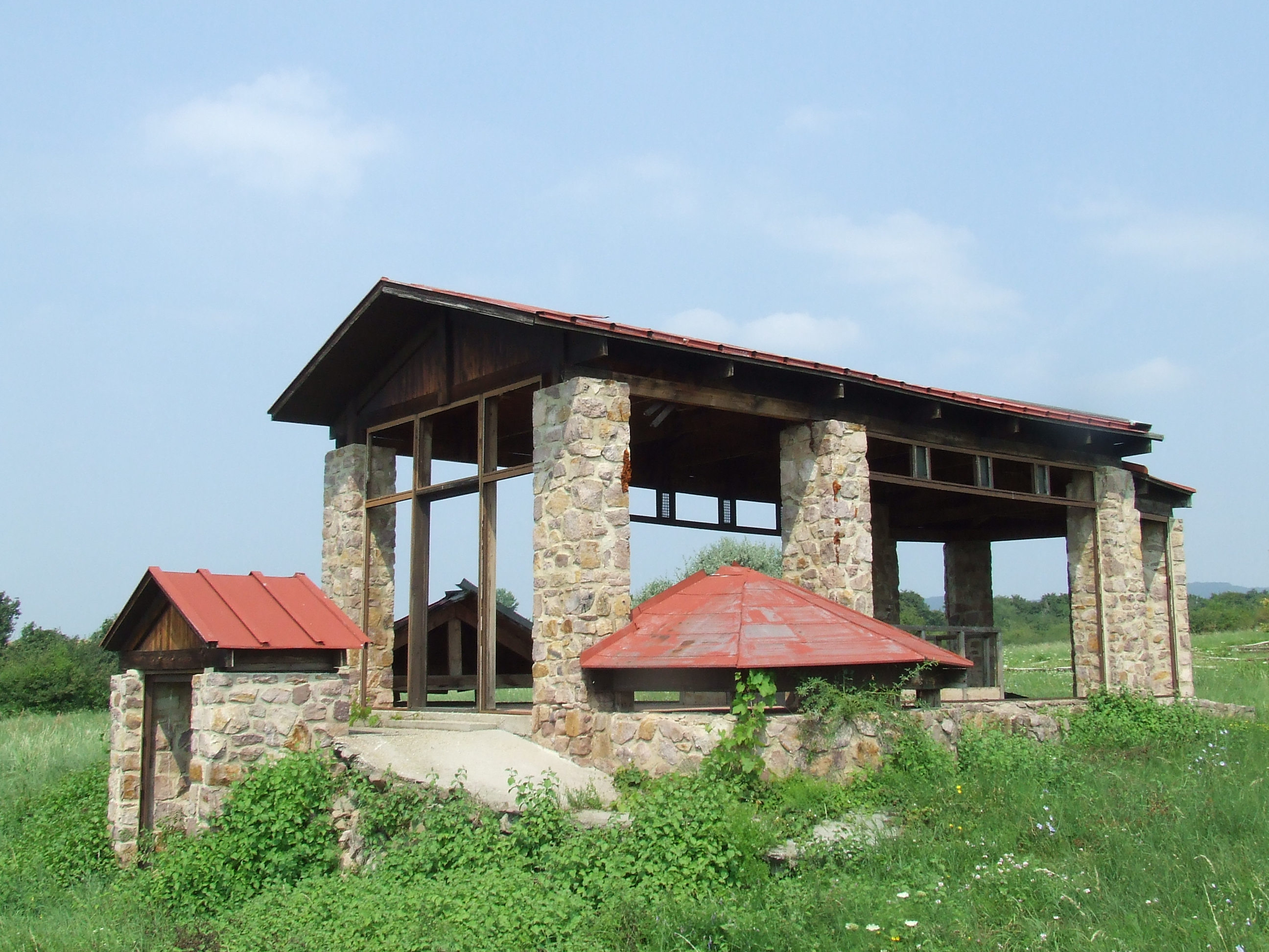 A kővágószőlősön feltárt római kori villa melletti ókeresztény mauzóleum rekonstruált épülete (1986–87-ben Hajnóczy Gyula tervei alapján)